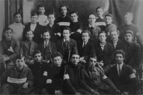 הועדה השניה של ההסתדרות